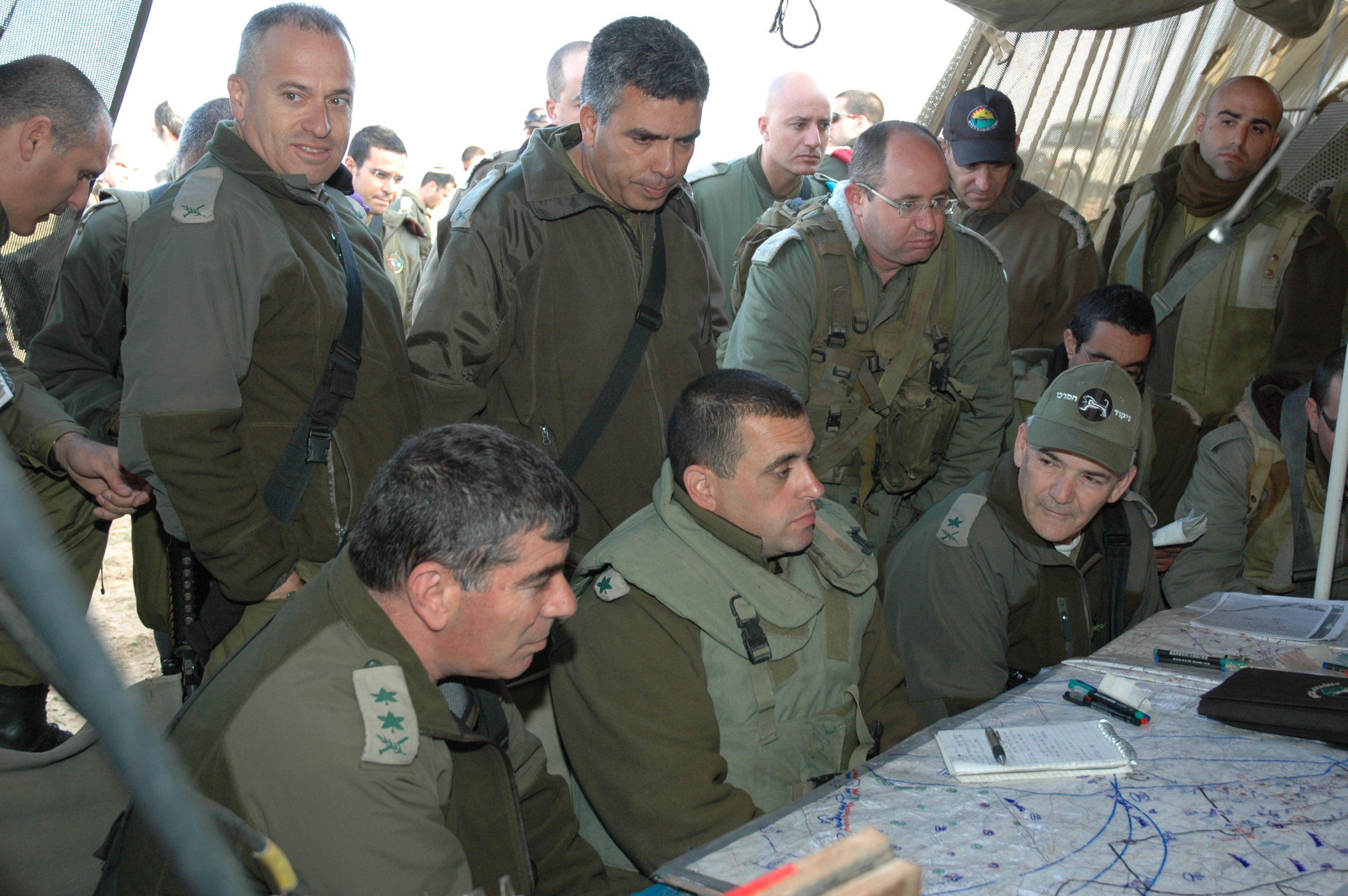 מפקדי חטיבה 130 באימון. יושבים משמאל לימין: הרמטכ"ל - רב אלוף גבי אשכנזי, במרכז - המח"ט אל"מ גיא חסון, מימין - אלוף פיקוד מרכז -אלוף אבי מזרחי. עומדים מאחור משמאל לימין: מפקד מל"י תא"ל אבי אשכנזי, במרכז - מפקד האוגדה -תא"ל יחזקאל אגאי. מימין סמח"ט ב' - סא"ל קובי